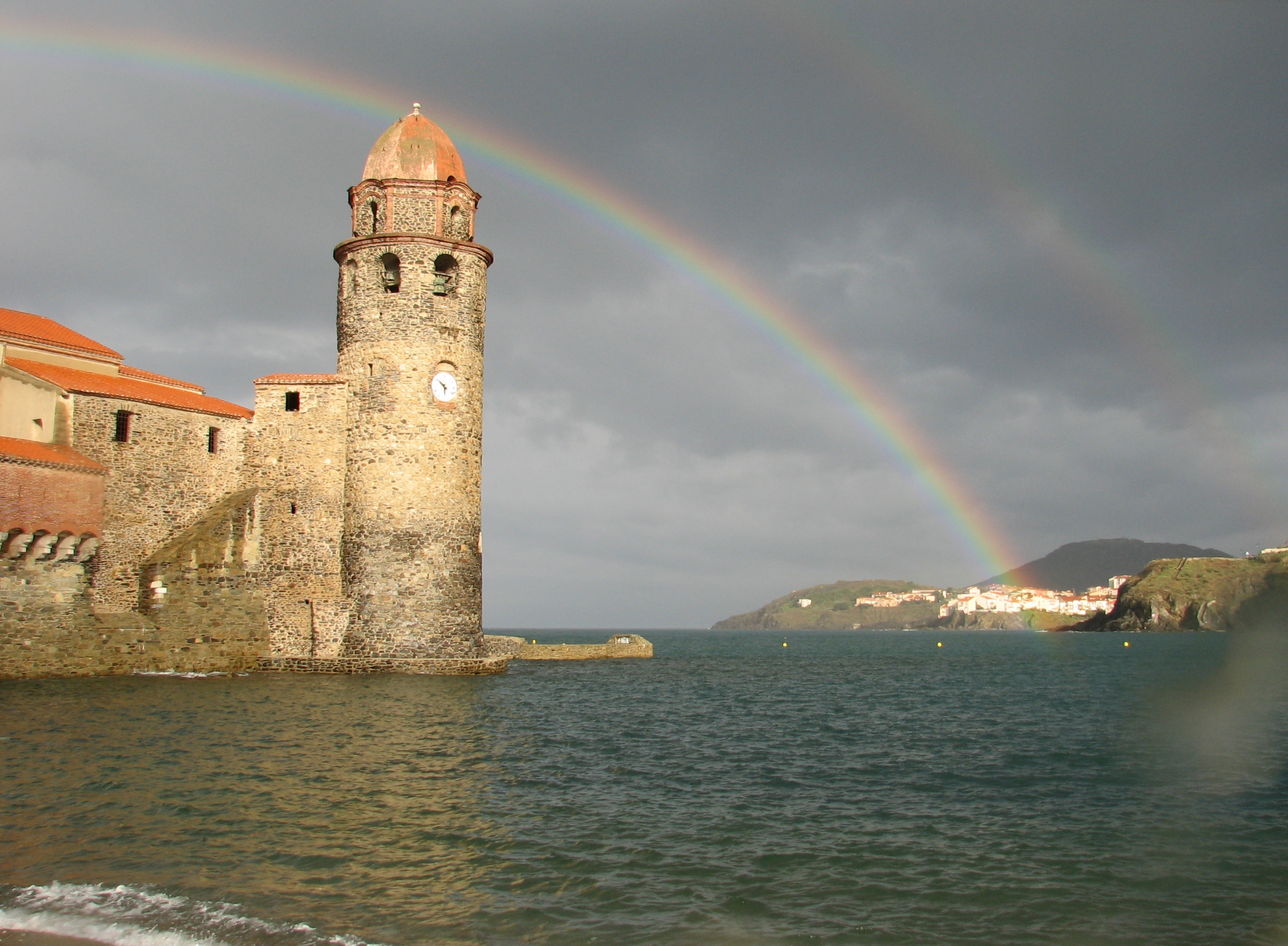 Collioure